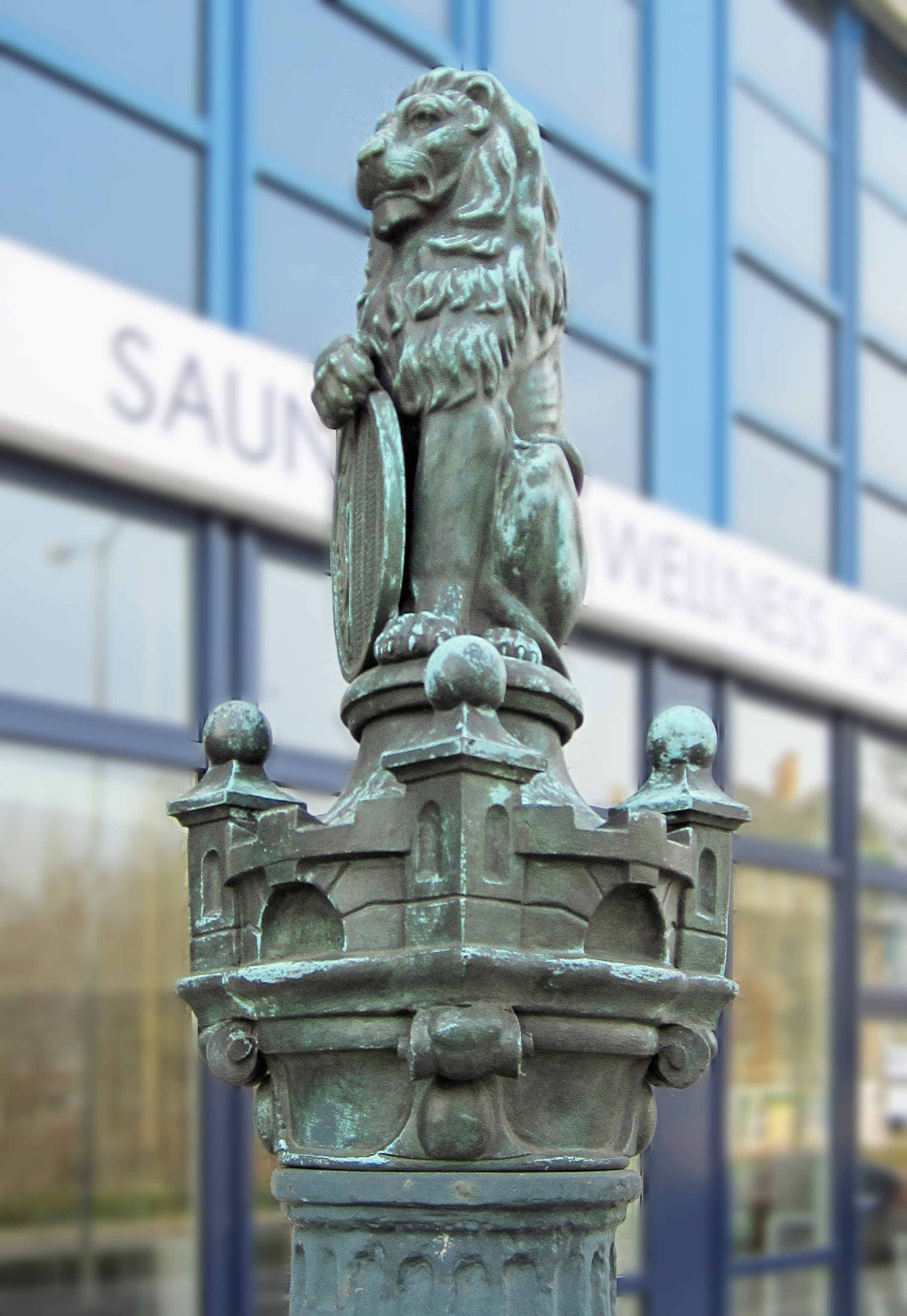 Leipzig, Ludwig-Erhard-Straße, Brunnen